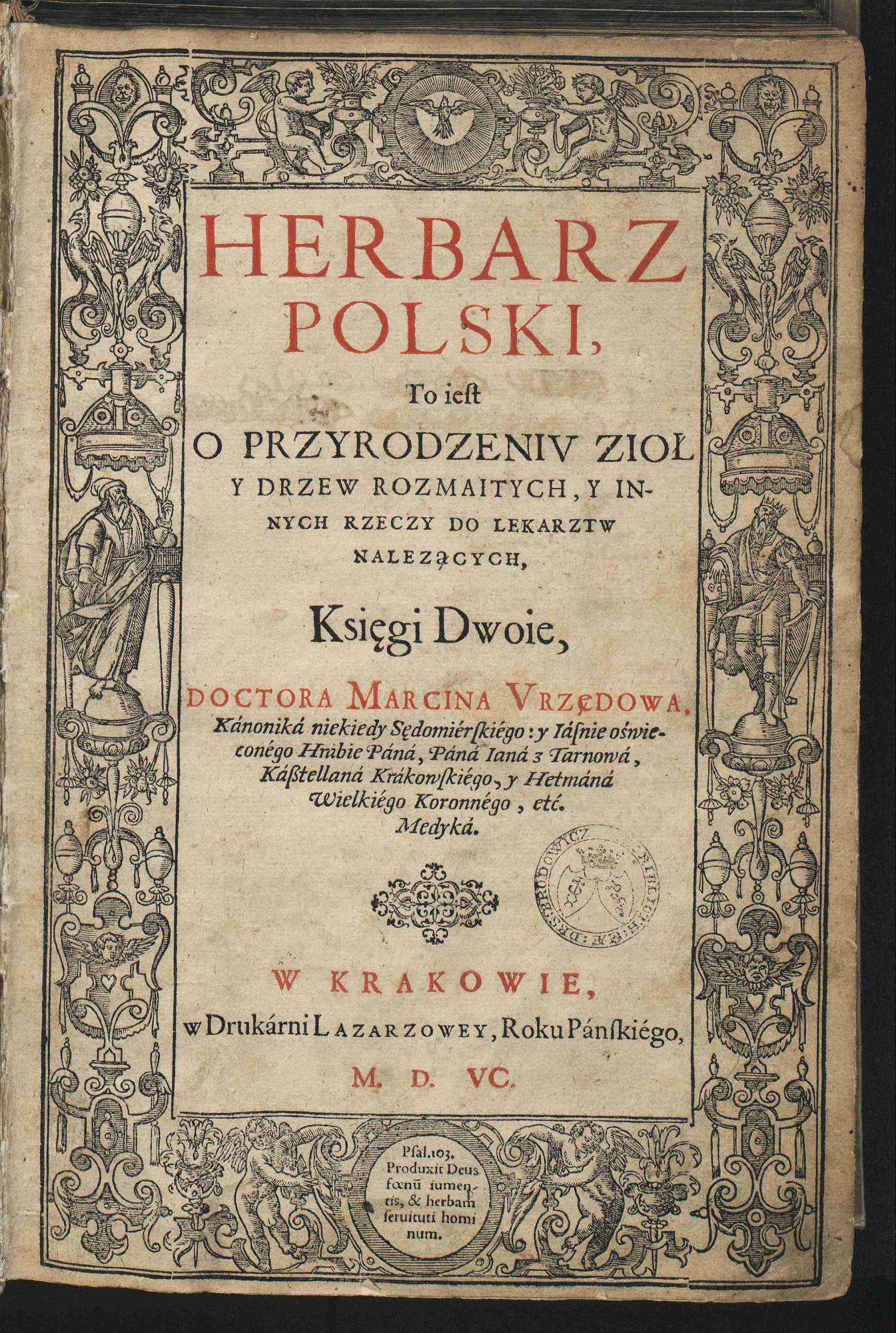 karta tytułowa Herbarza Polskiego